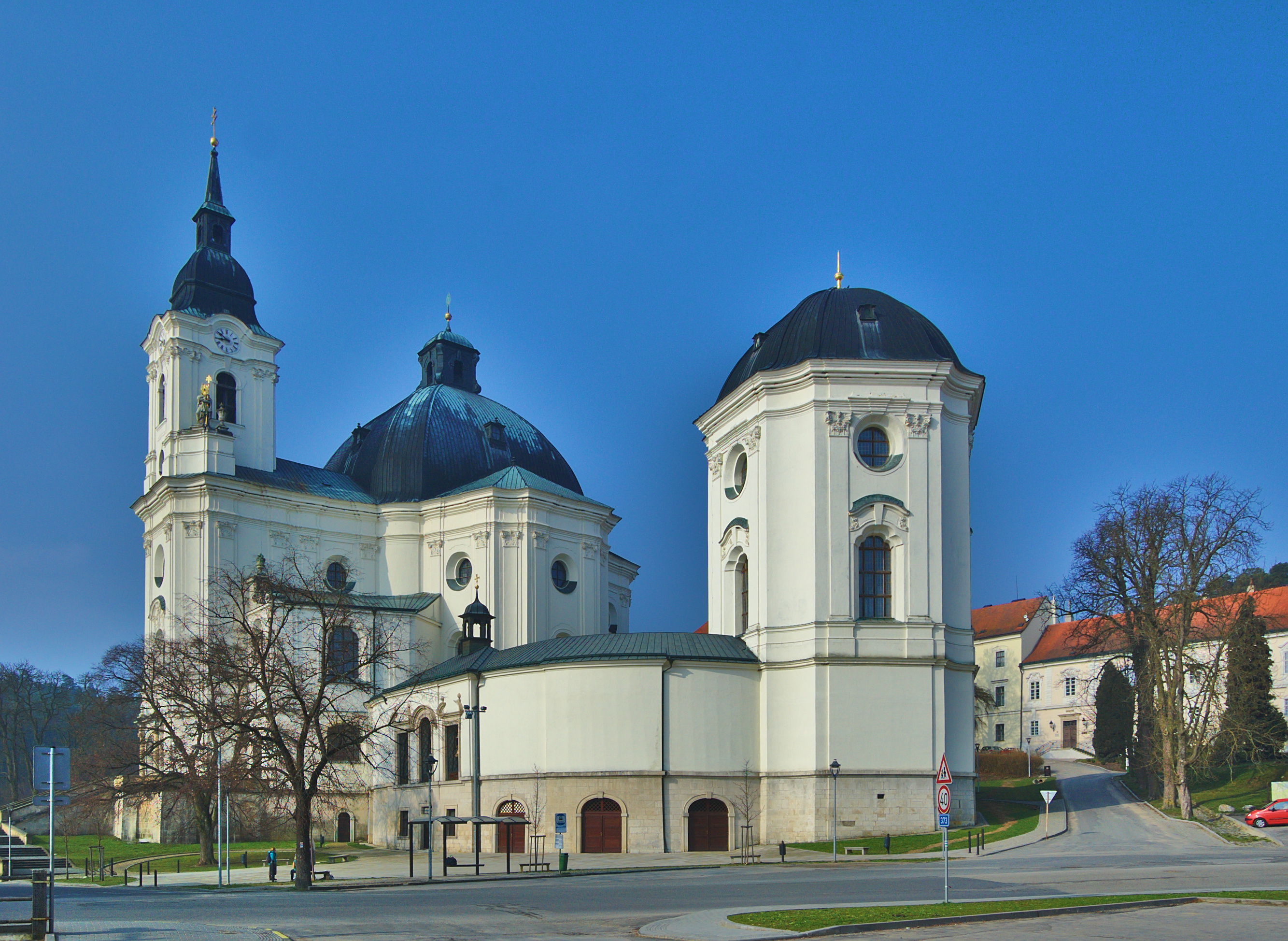 Chrám Jména Panny Marie, Křtiny, okres Blansko